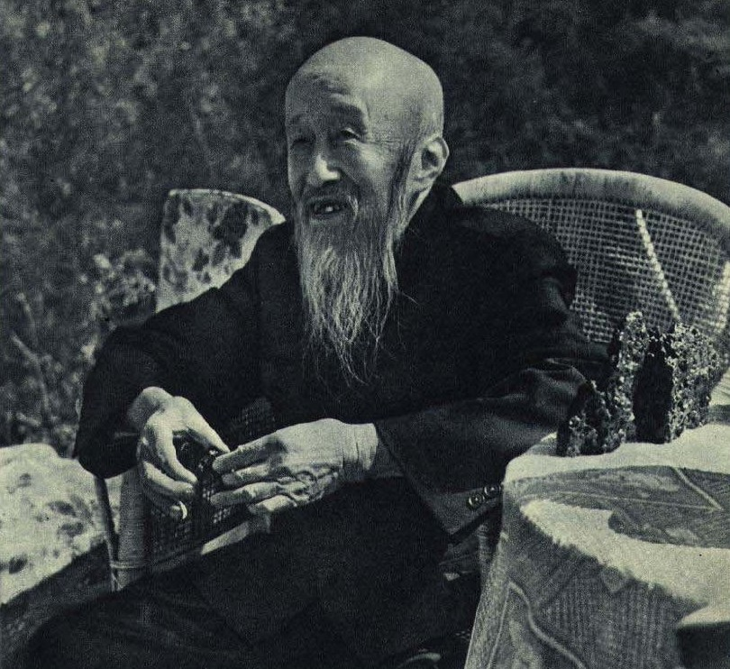 1962-02 1962年 沈钧儒